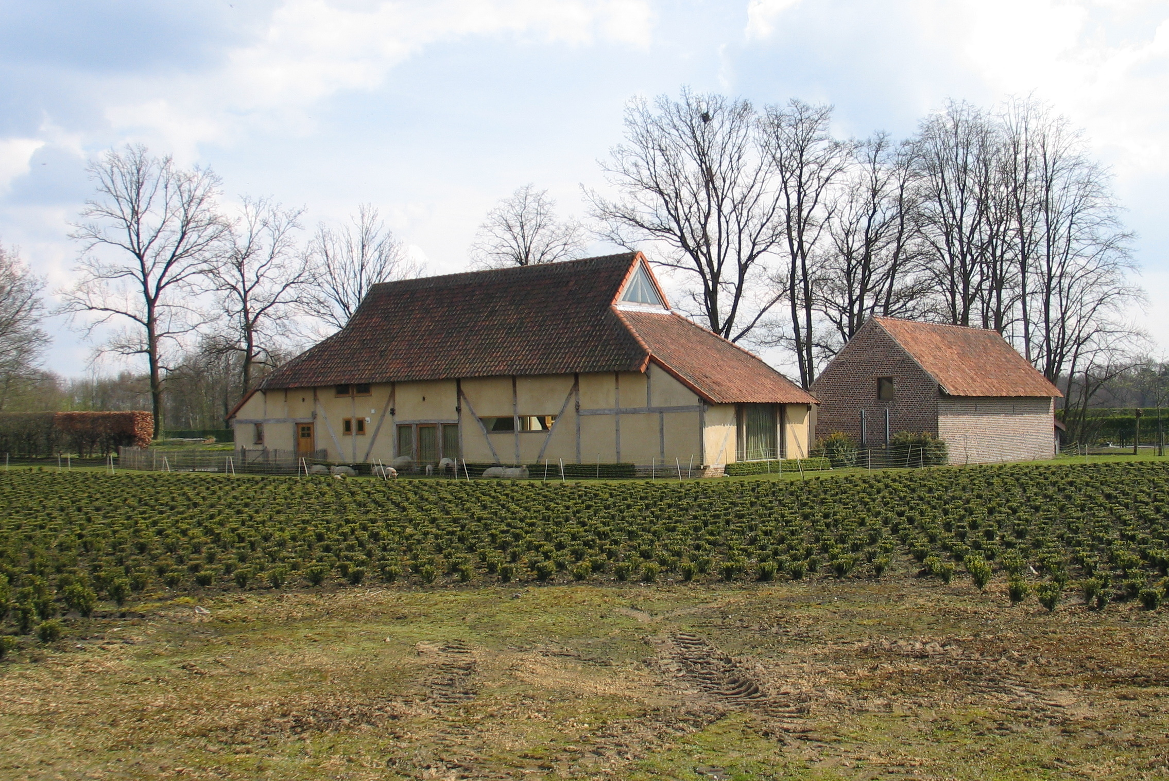 De Rooiermolen in Diepenbeek, België